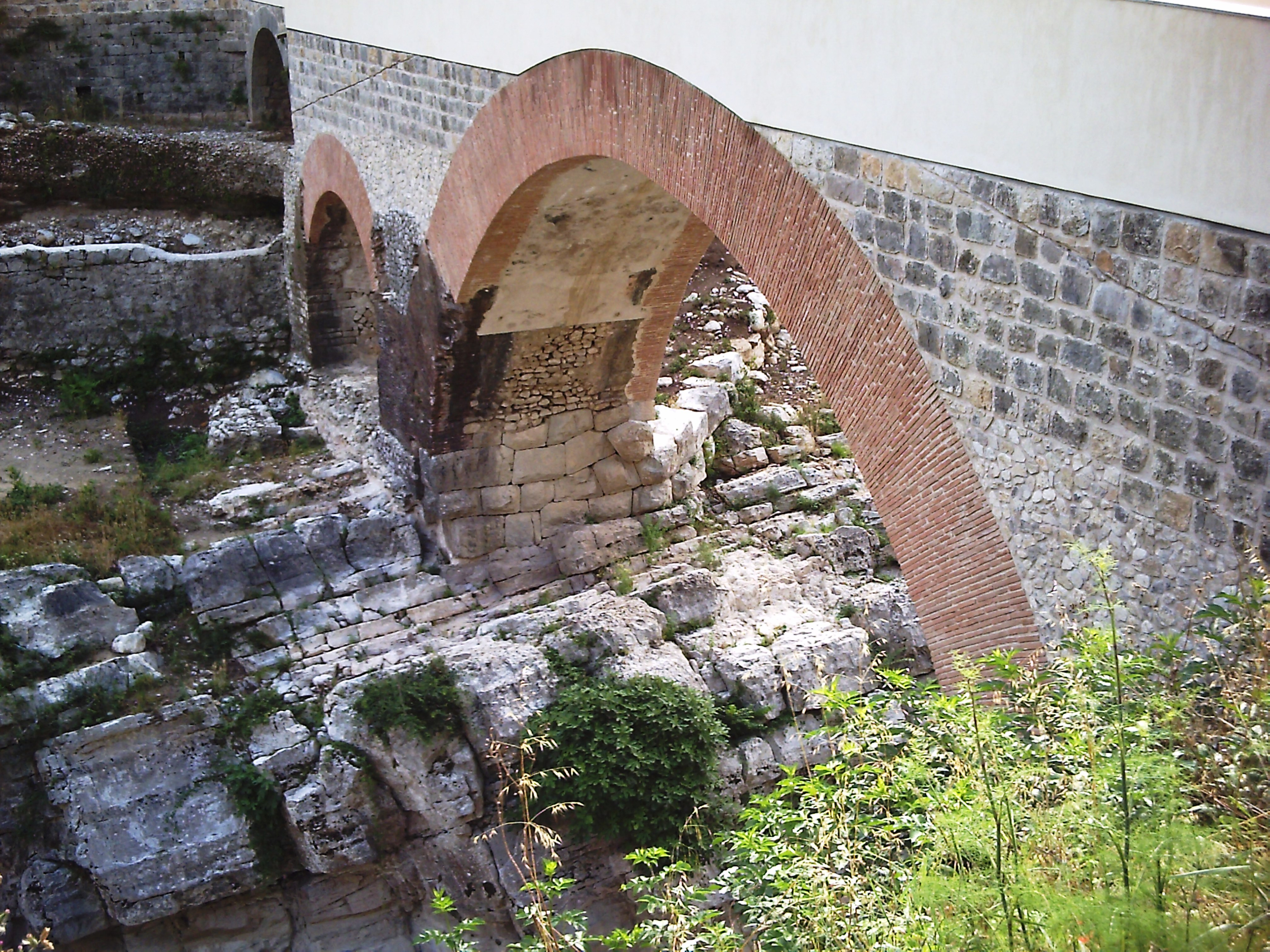 Scorcio di Ponte Fabio Massimo in Faicchio (Bn)